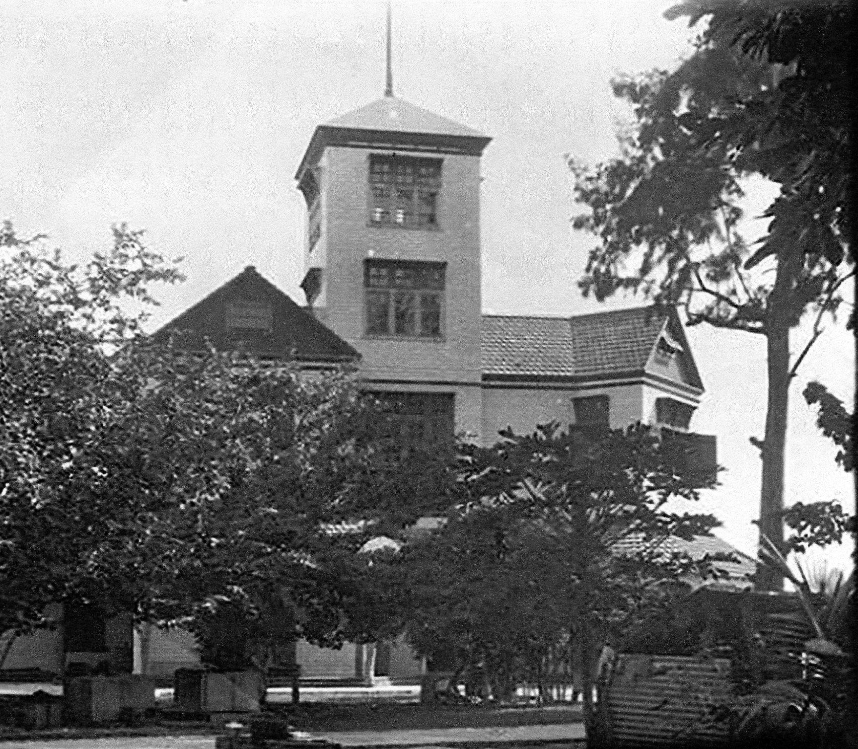 descrizione = "Oceania House", residenza re delle isole Cocos (Australia), fonte = immagine acquisita tramite scanner da cartolina d'epoca anni trenta; data = 15/03/2013; autore = Louis; licenza = vedasi sotto; copyright = vedasi sotto